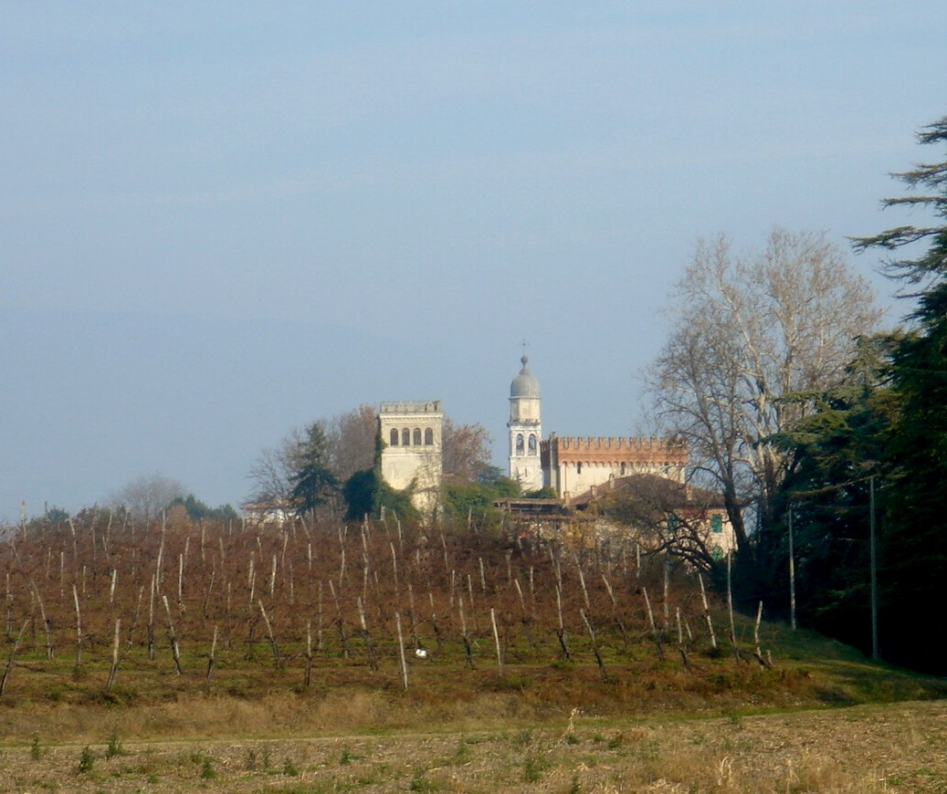 I simboli della vecchia Colle: il campanile della chiesa di San Tommaso spicca dietro la Villa-castello Lucheschi. In primo piano un caratteristico terrazzamento coltivato a vigneto